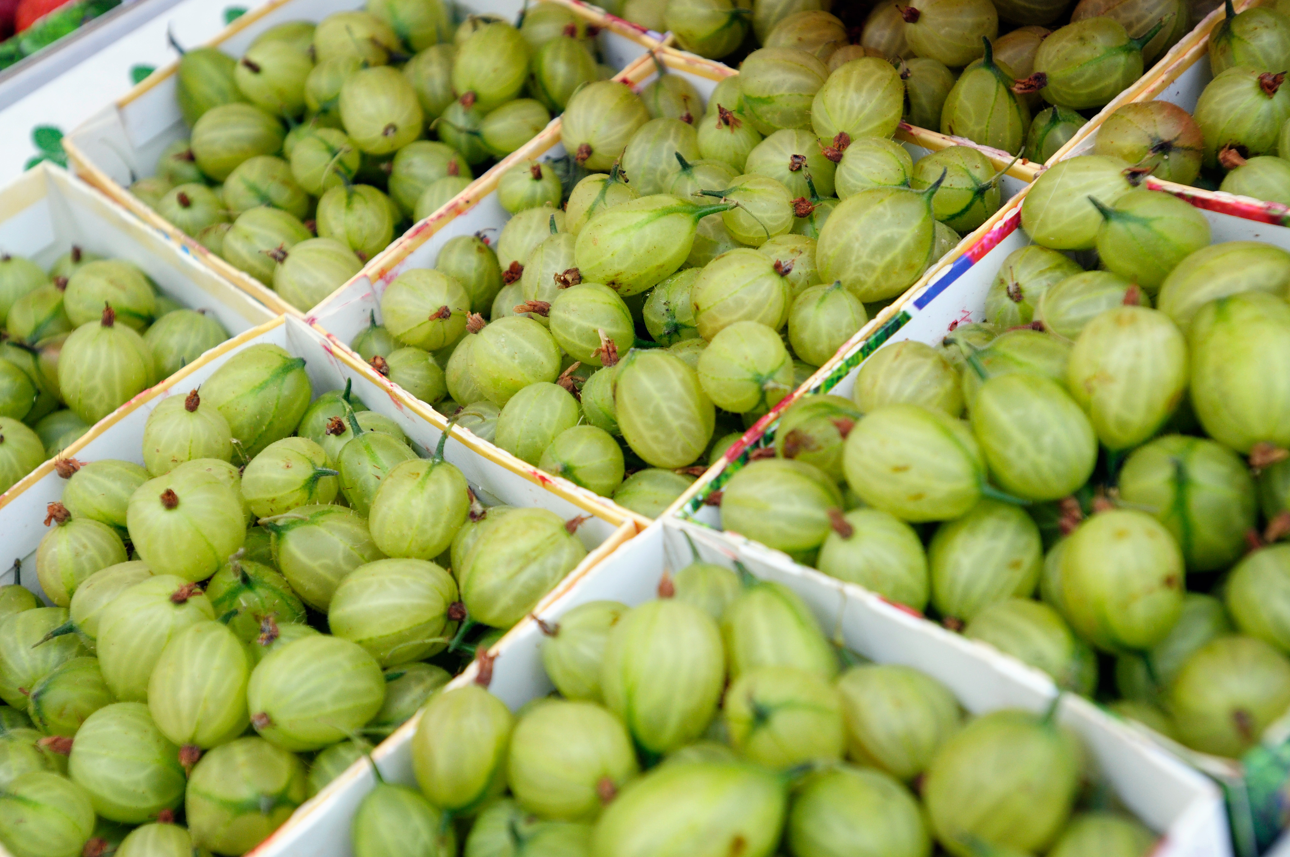 Krusbär